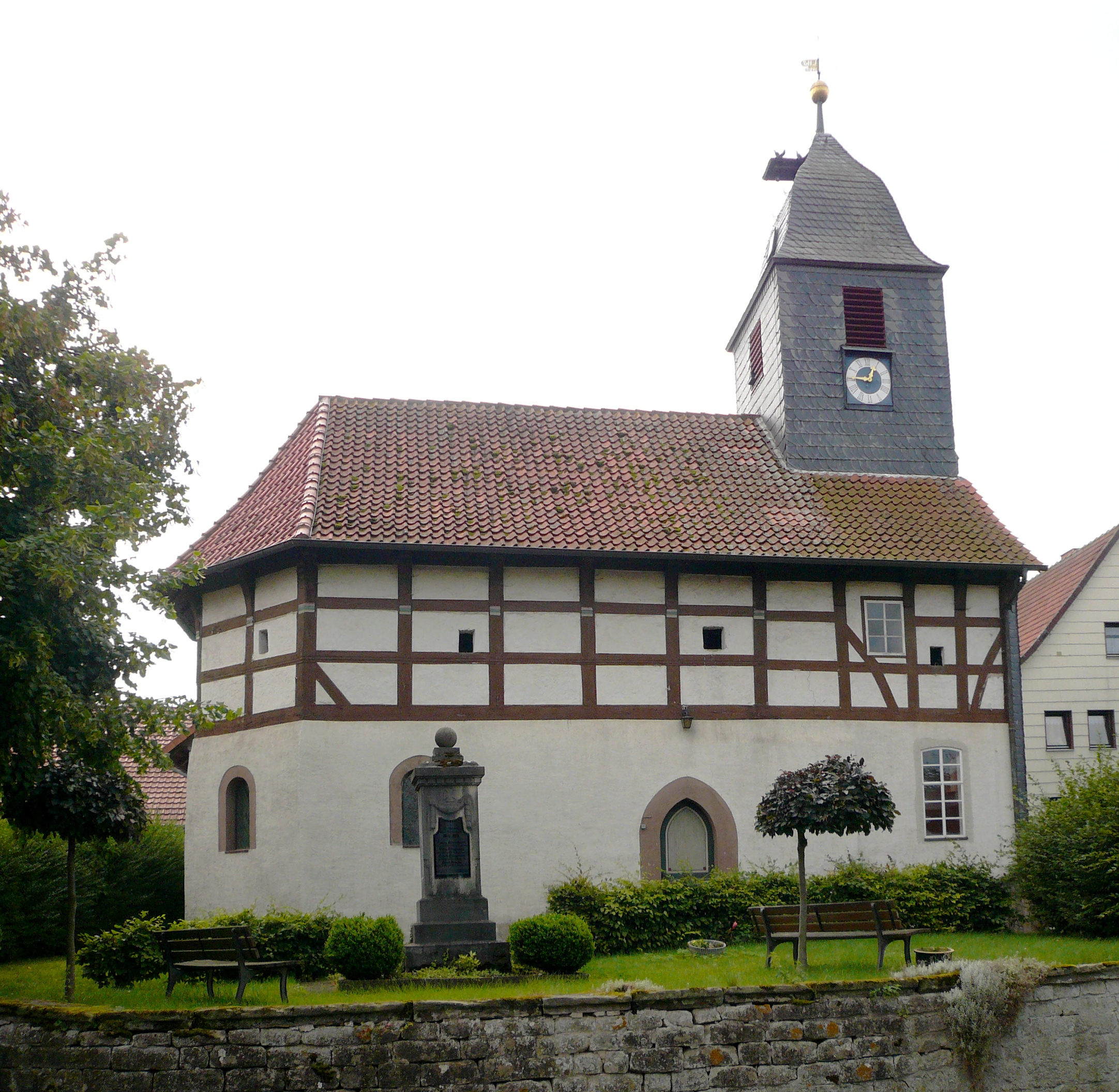 Ev.luth. Kirche St. Urbanus in Lemshausen, Gemeinde Rosdorf, Niedersachsen. Geweiht 1515, Fachwerkoberstock um 1700 erneuert, Erweiterung und Dachreiter frühes 19. Jahrhundert